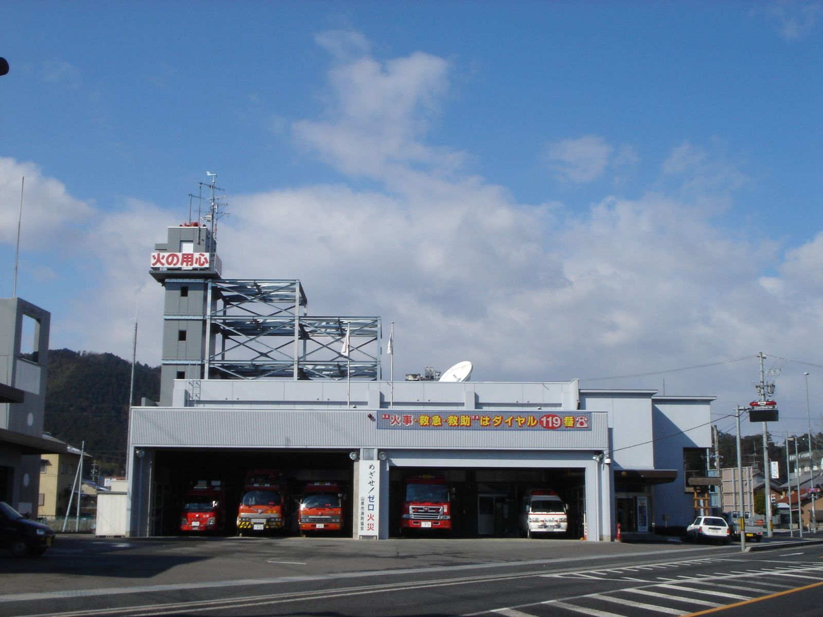 Minami Fire station in Yamagata city,Gifu(山県市南消防署),Yamagata,Gifu,Japan(岐阜県山県市高木)で撮影。